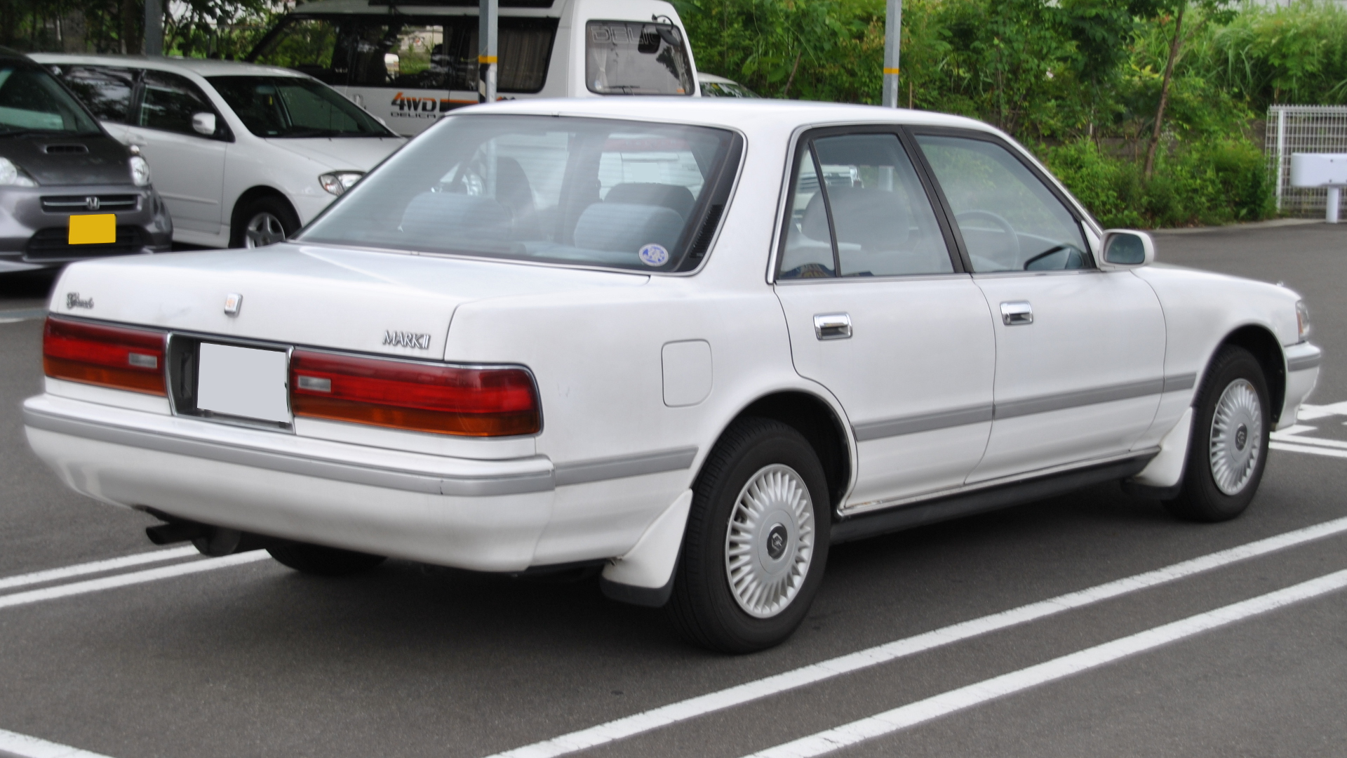 X80型トヨタ・マークIIセダン